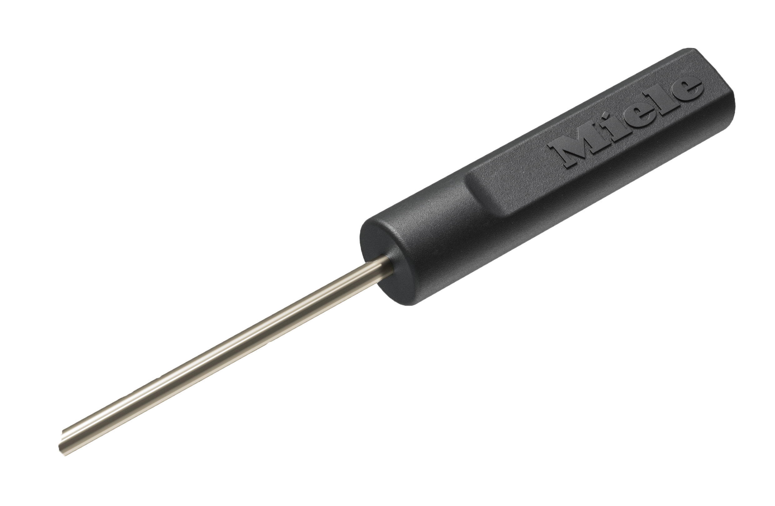 Temperatur Spieß ausgestattet mit SAW-Sensoren